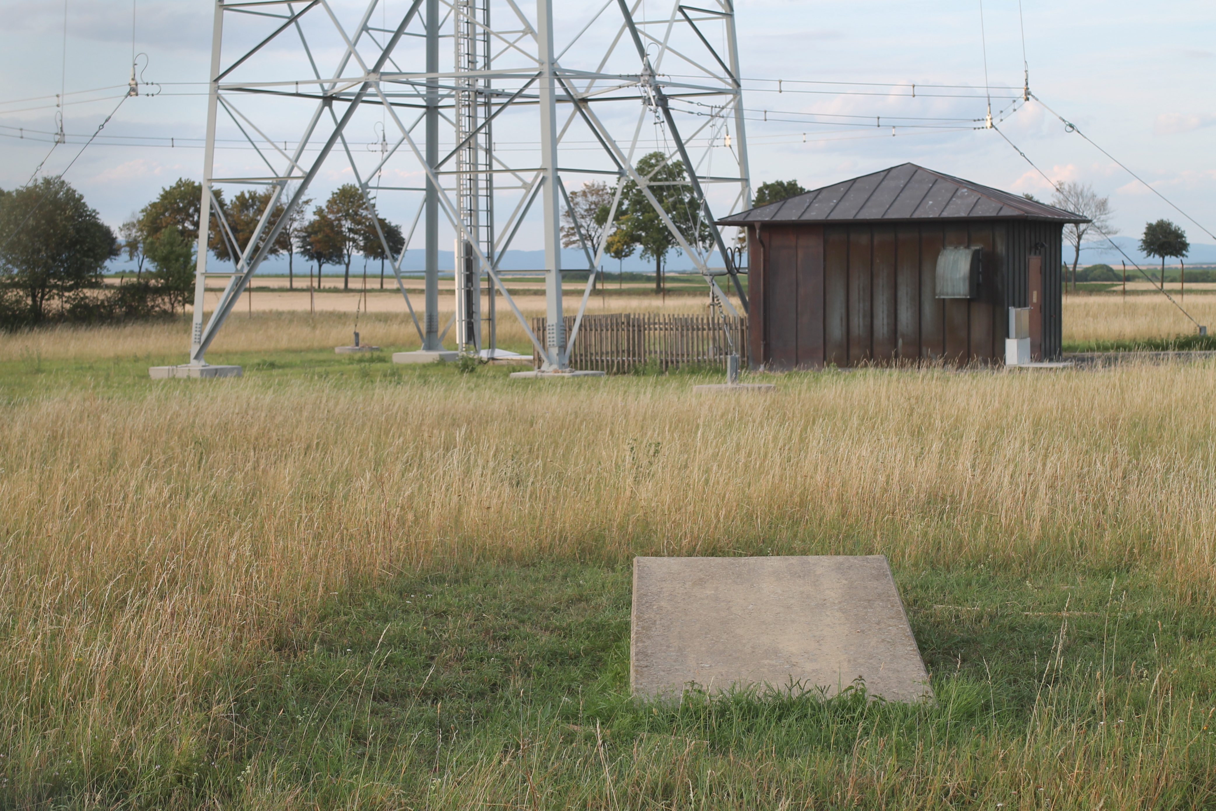 Fuß des Sendeturms des Rheinsenders